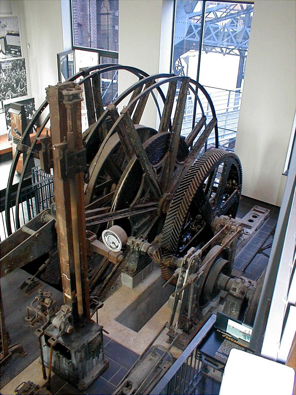 Salle des machines ou sont commandées les cages d'ascenseurs 3